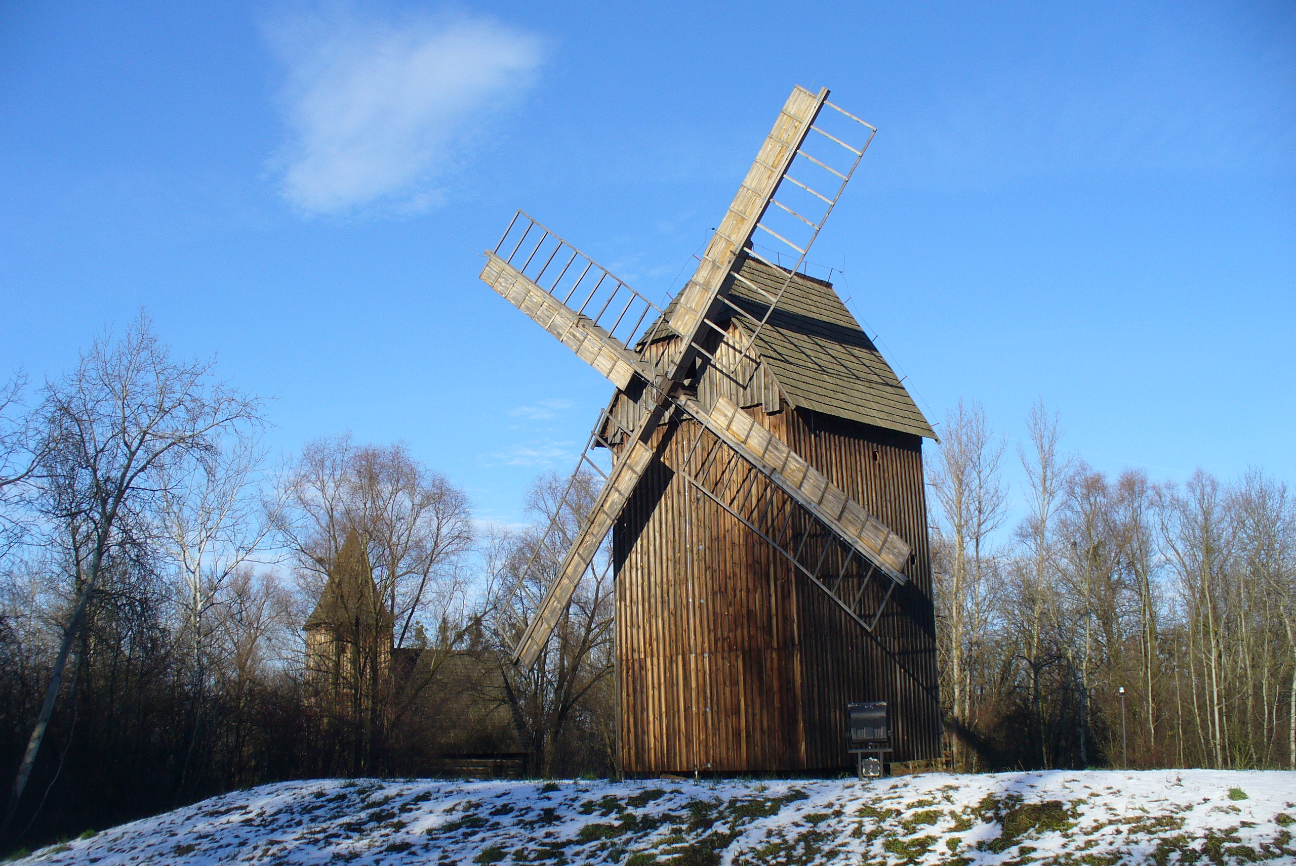 Wiatrak w Muzeum Wsi Opolskiej*Windmill in Opole Village Museum. Windmühle in Oppeln-Birkowitz